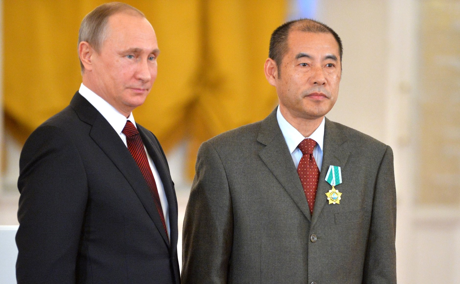 Церемония вручения государственных наград России иностранным гражданам. Орденом Дружбы награждён директор Пекинского центра славистики при Столичном педагогическом университете, один из составителей и пере­водчиков полного собрания сочинений А.С.Пушкина на китайский язык Вэньфэй Лю.